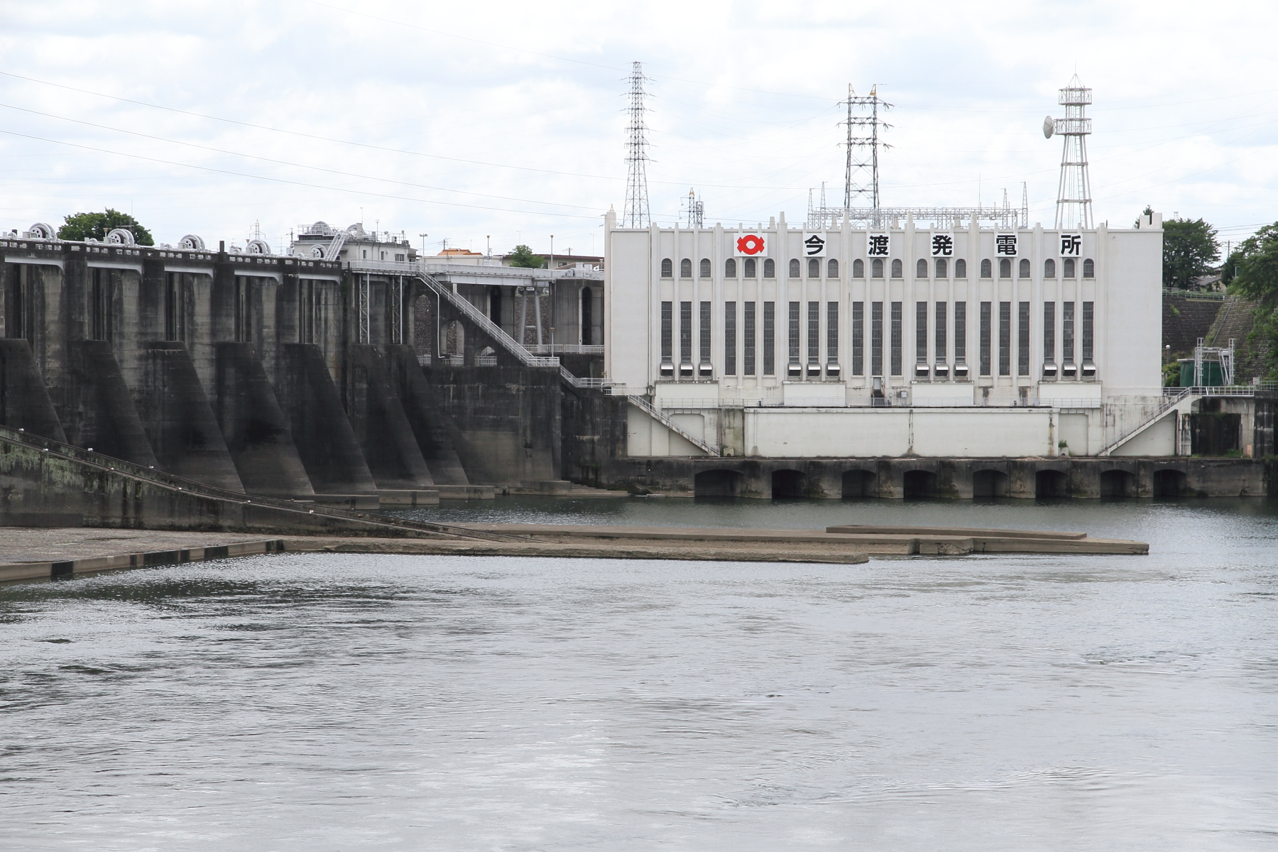 今渡ダムに付属する今渡発電所。